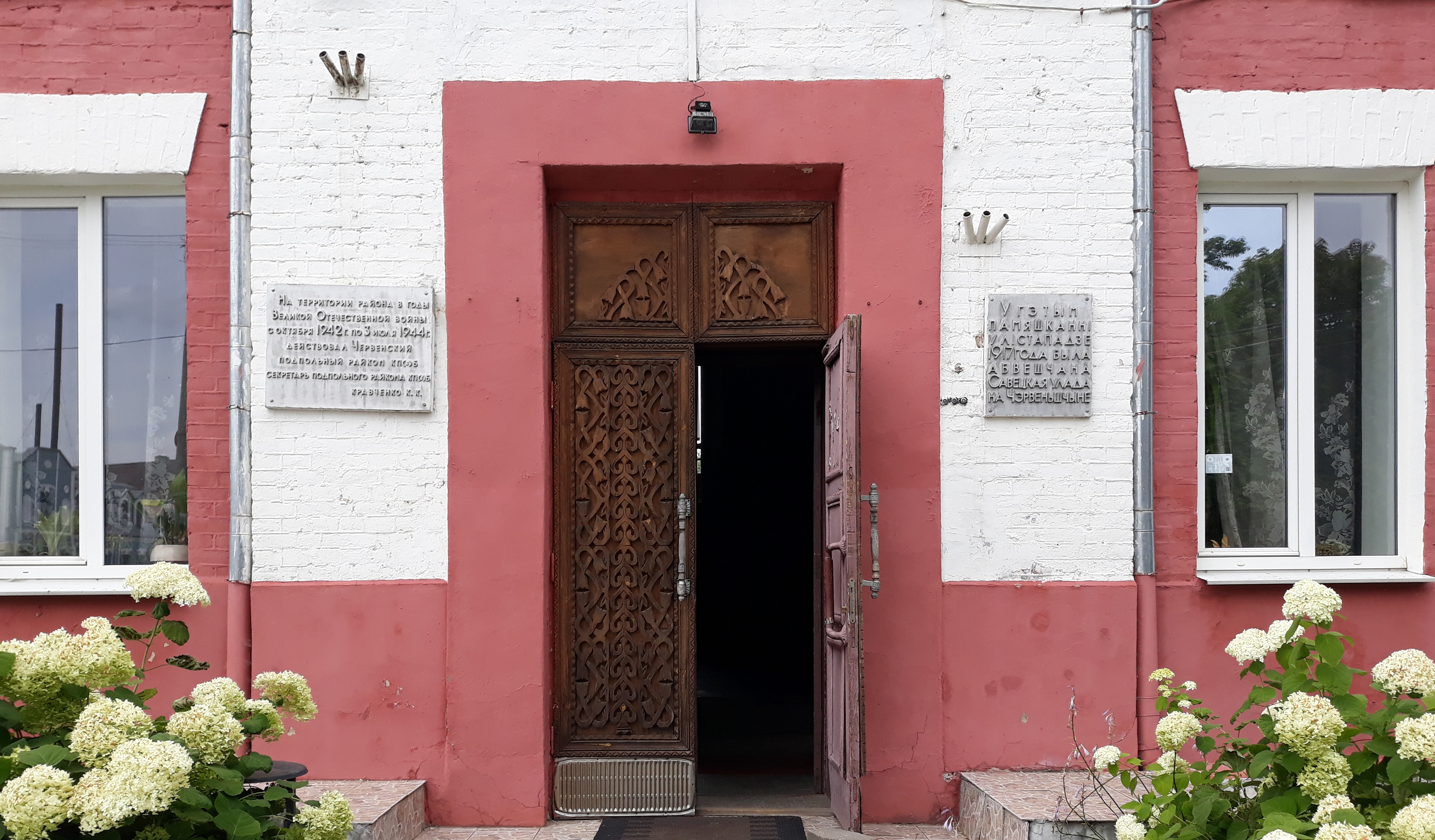 цэнтральны уваход у Дом Кудзіна і мемарыяльныя дошкі